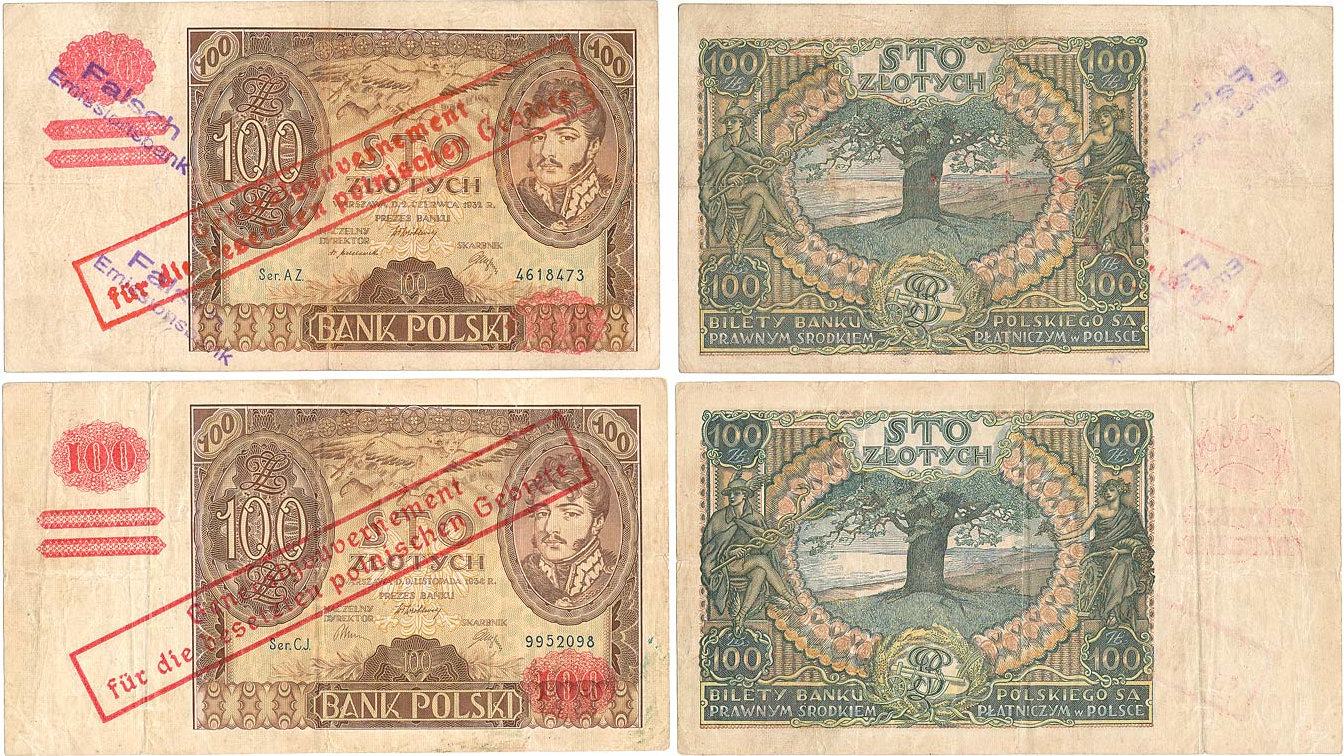 Fałszywe nadruki 100 złotych 1932 i 1934